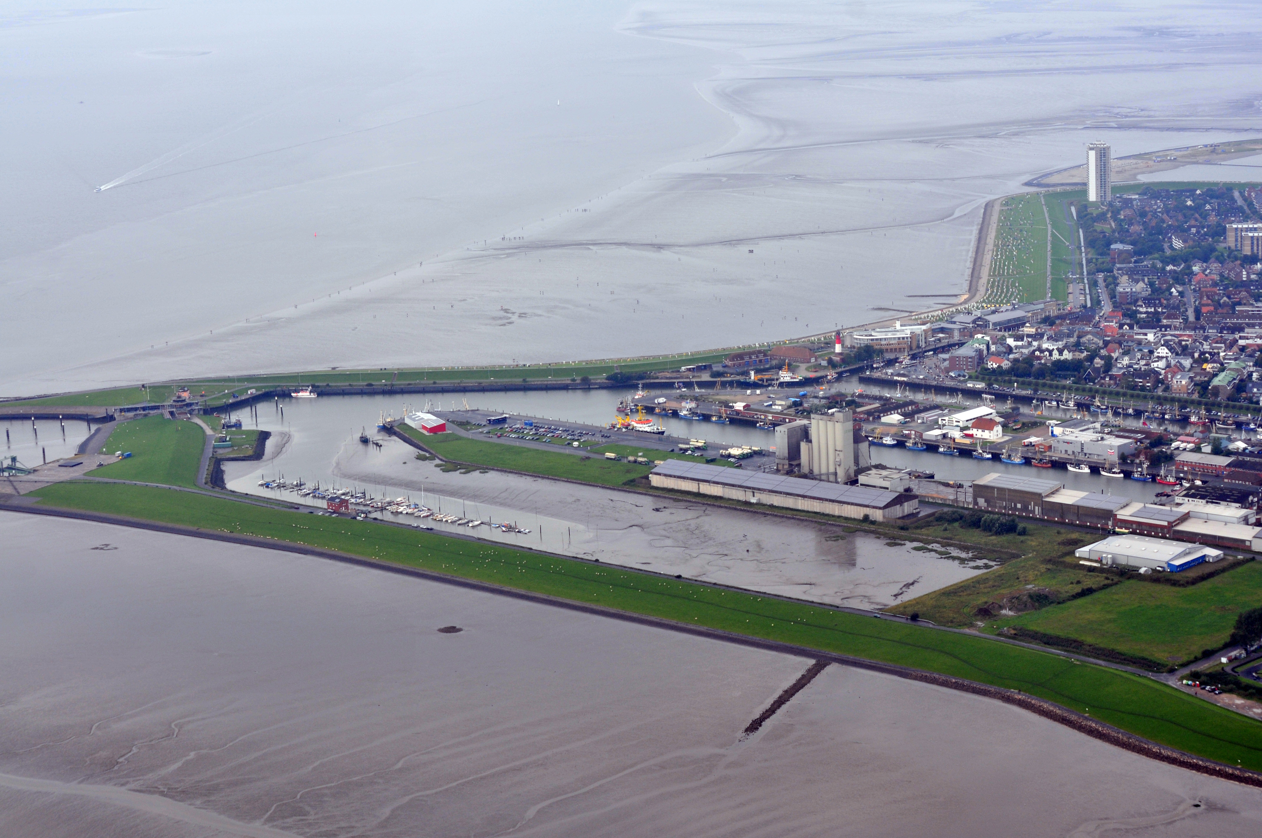 Fotoflug 4. Sept. 2011 Dieses Foto entstand aufgrund eines Projektes, das von Wikimedia Deutschland e. V. gefördert wurde. Im Rahmen des „Community-Projektbudgets“ sollen Luftbilder u.a. von Inseln, Halligen, Sanden und Küstenorten der deutschen Nordseeküste angefertigt werden. Das Projekt „Fotoflüge“ wurde im September 2011 begonnen.